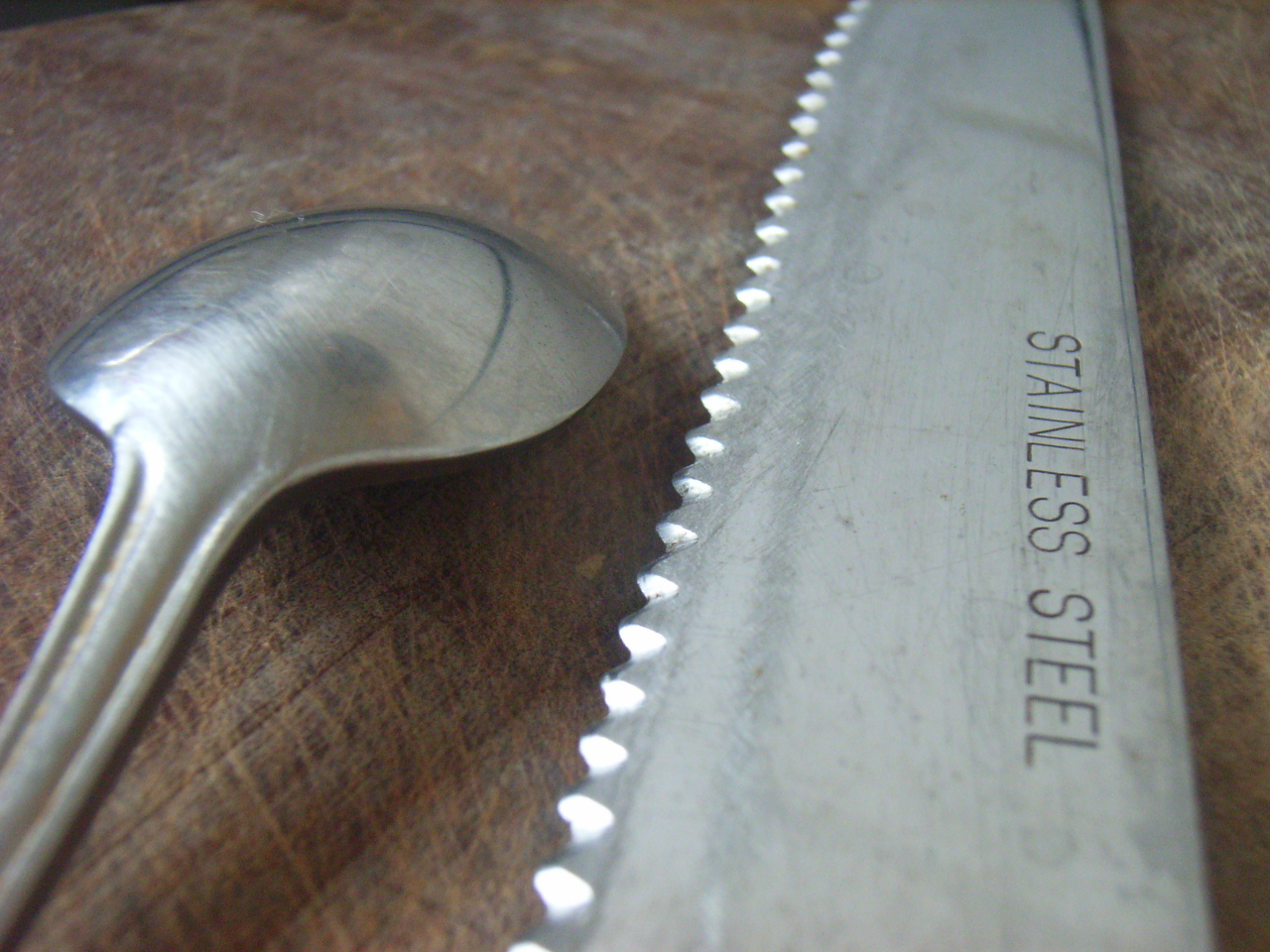 廚具刀具